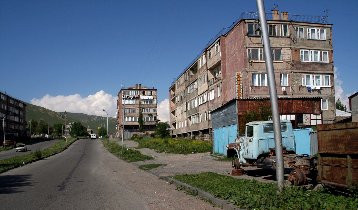 Centre-ville de Sevan en Arménie